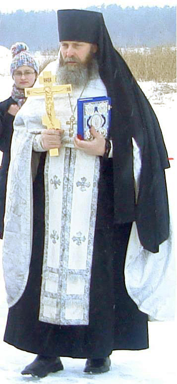 Иеромонах